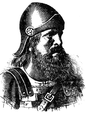 Caballero hidalgo de las montañas de Burgos